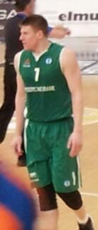 València-Unics final d'Eurocup.